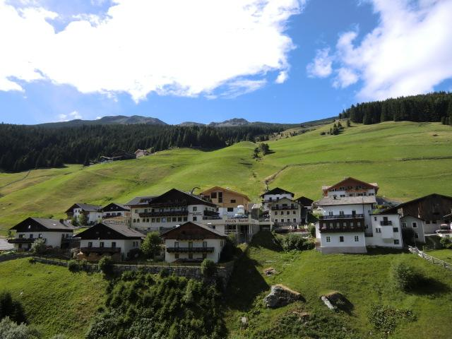 Bild vom Durnholzer "Dörfel"